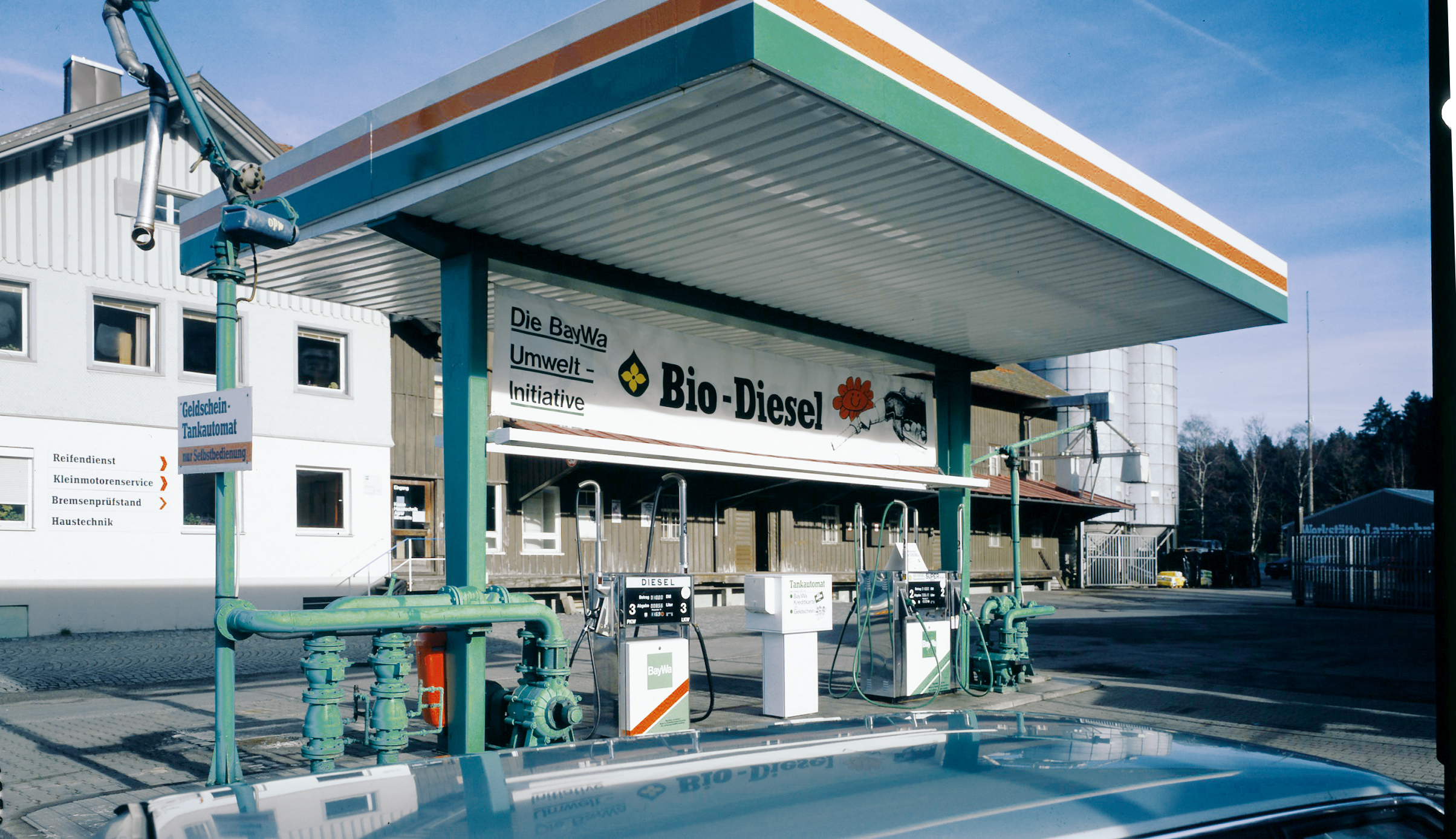 Vollautomatische Tankstelle der BayWa AG mit Bio-Diesel